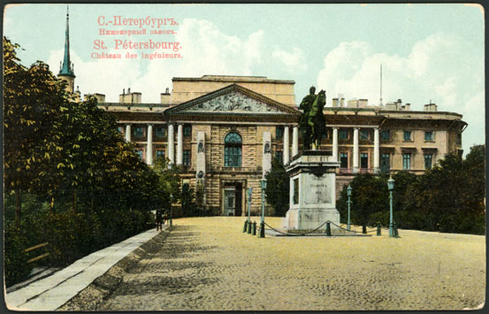 Памятник Петру I и южный фасад